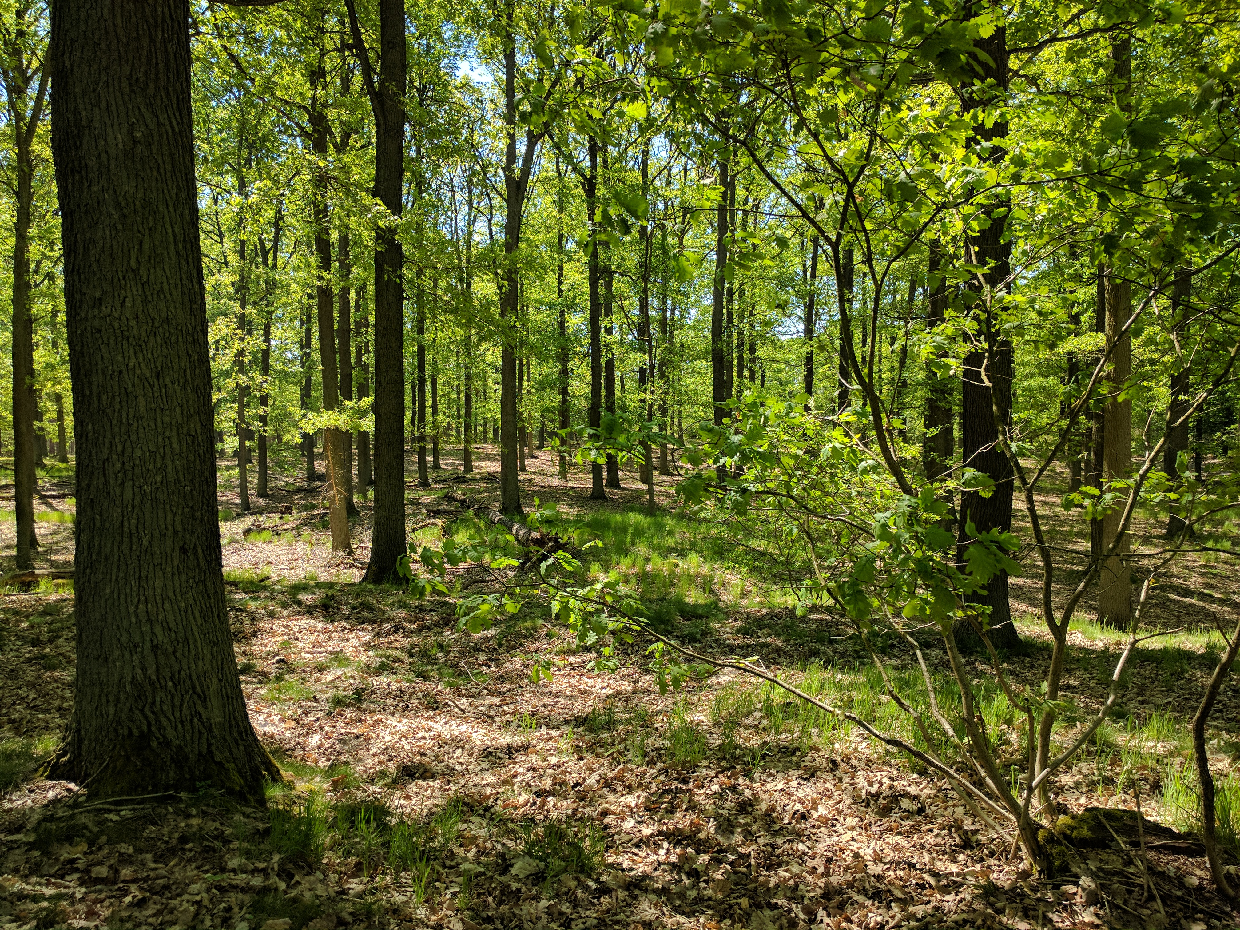 Trauben-Eichenwald im Naturschutzgebiet Dubrow (Land Brandenburg, Gemarkung Gräbendorf); LSG Dahme - Heideseen